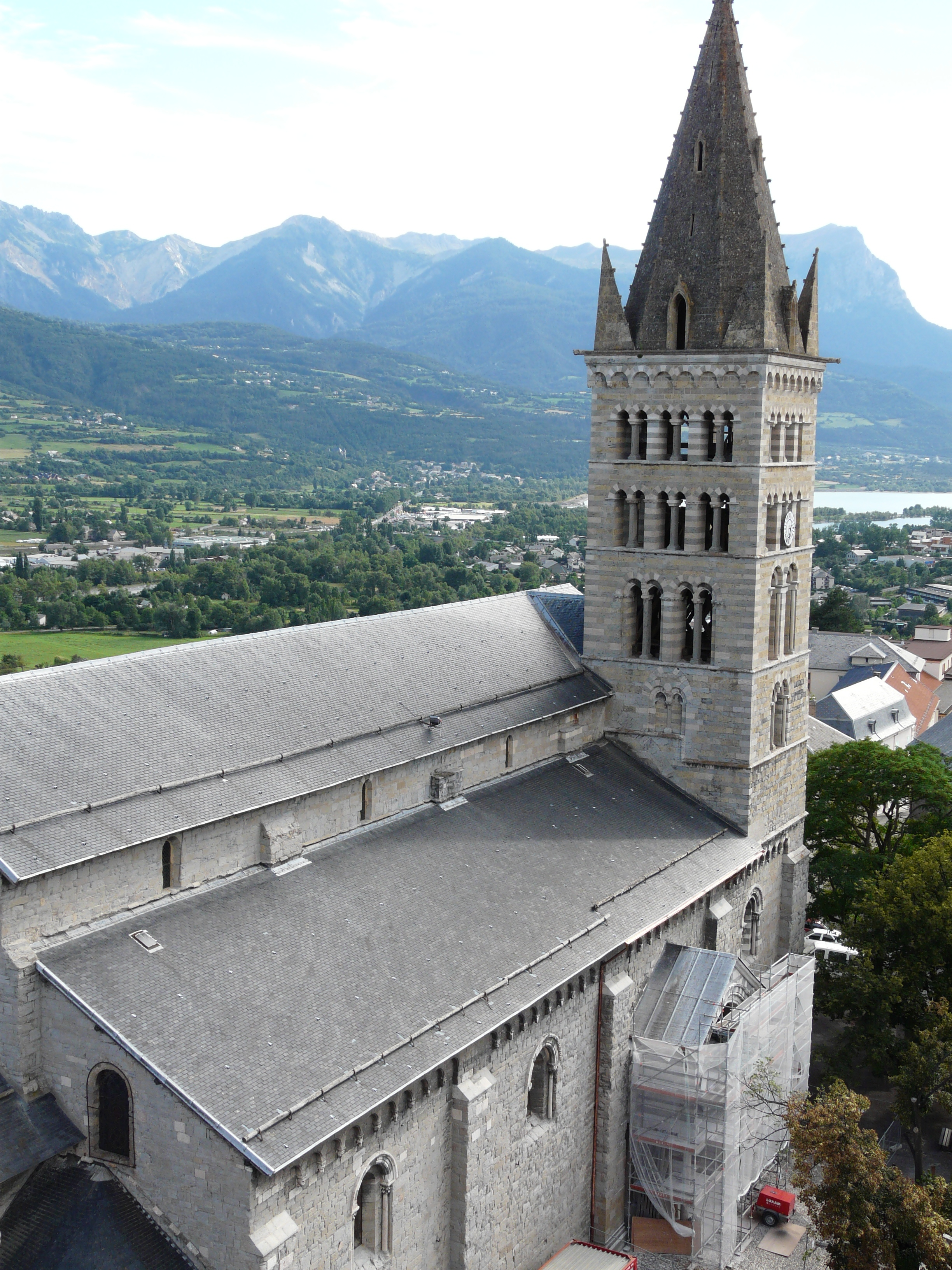 Cathédrale Notre-Dame du Réal depuis la Tour Brune. Embrun .